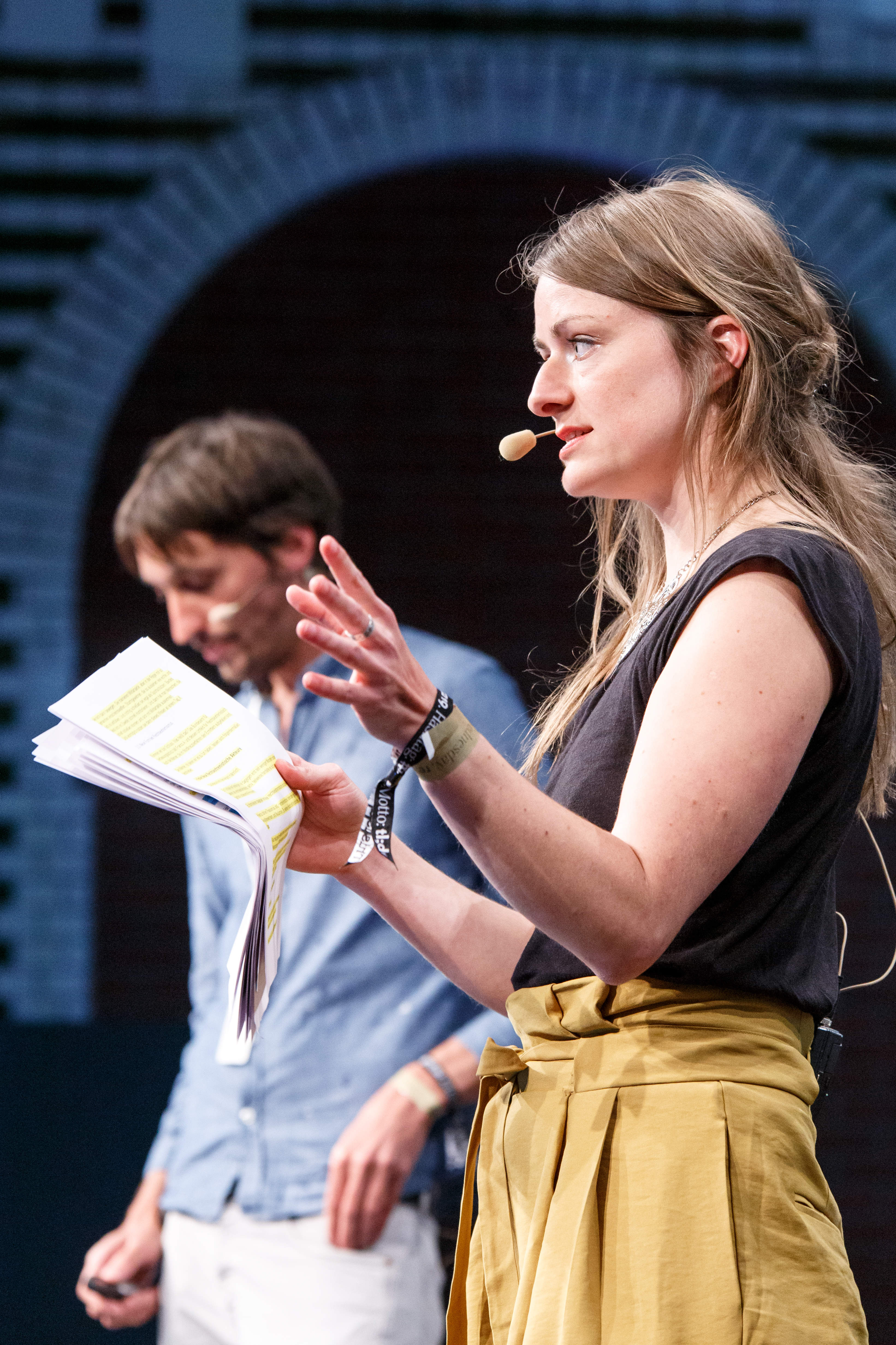 Talk: Die Akte Hannibal – ein Werkstattbericht Speaker: Christina Schmidt, Martin Kaul, Sebastian Erb, Alexander Nabert